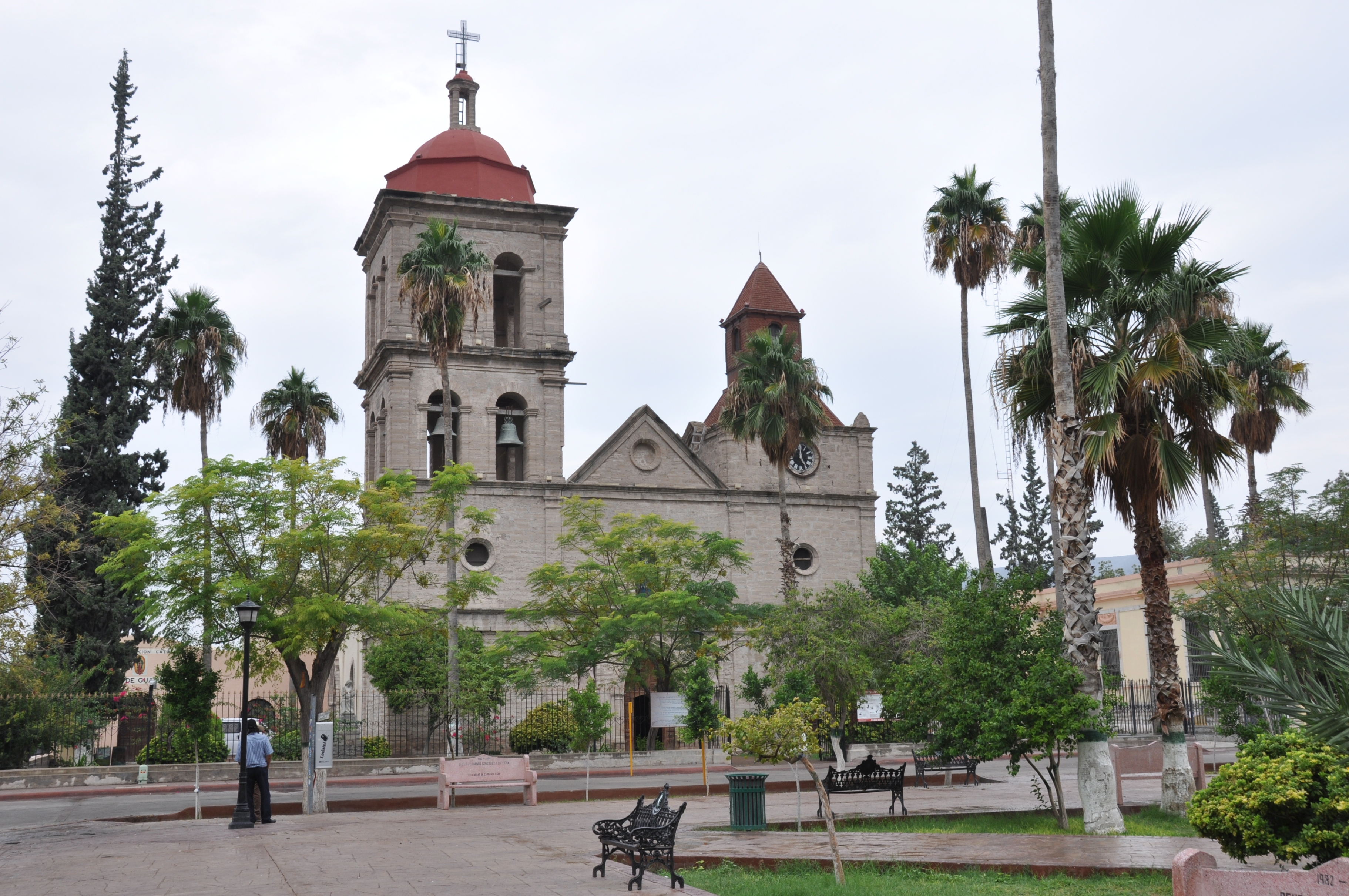 Iglesia de Cuatro Ciénegas Coahuila